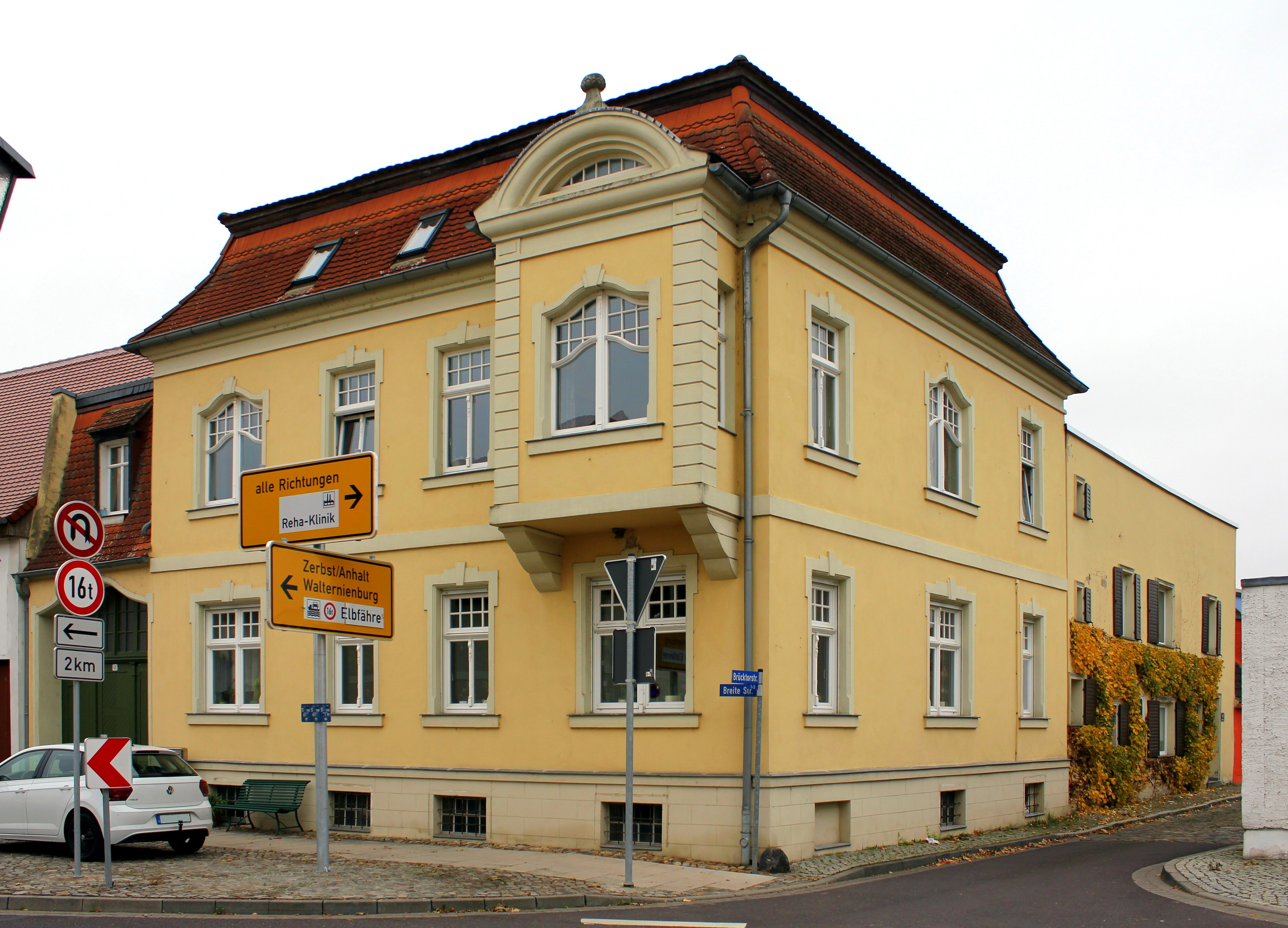 Wohnhaus Breite Straße 41 Barby